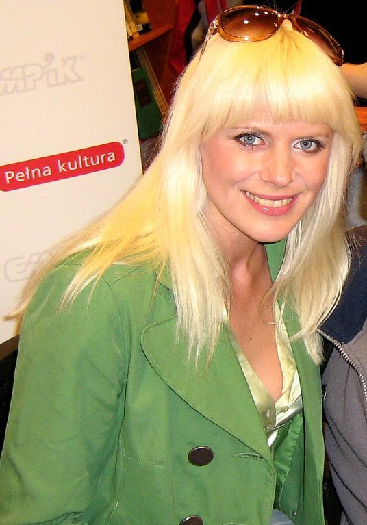 Maria Sadowska, znana bardziej jako Marysia Sadowska (ur. 27 czerwca 1976) - polska piosenkarka muzyki klubowej.